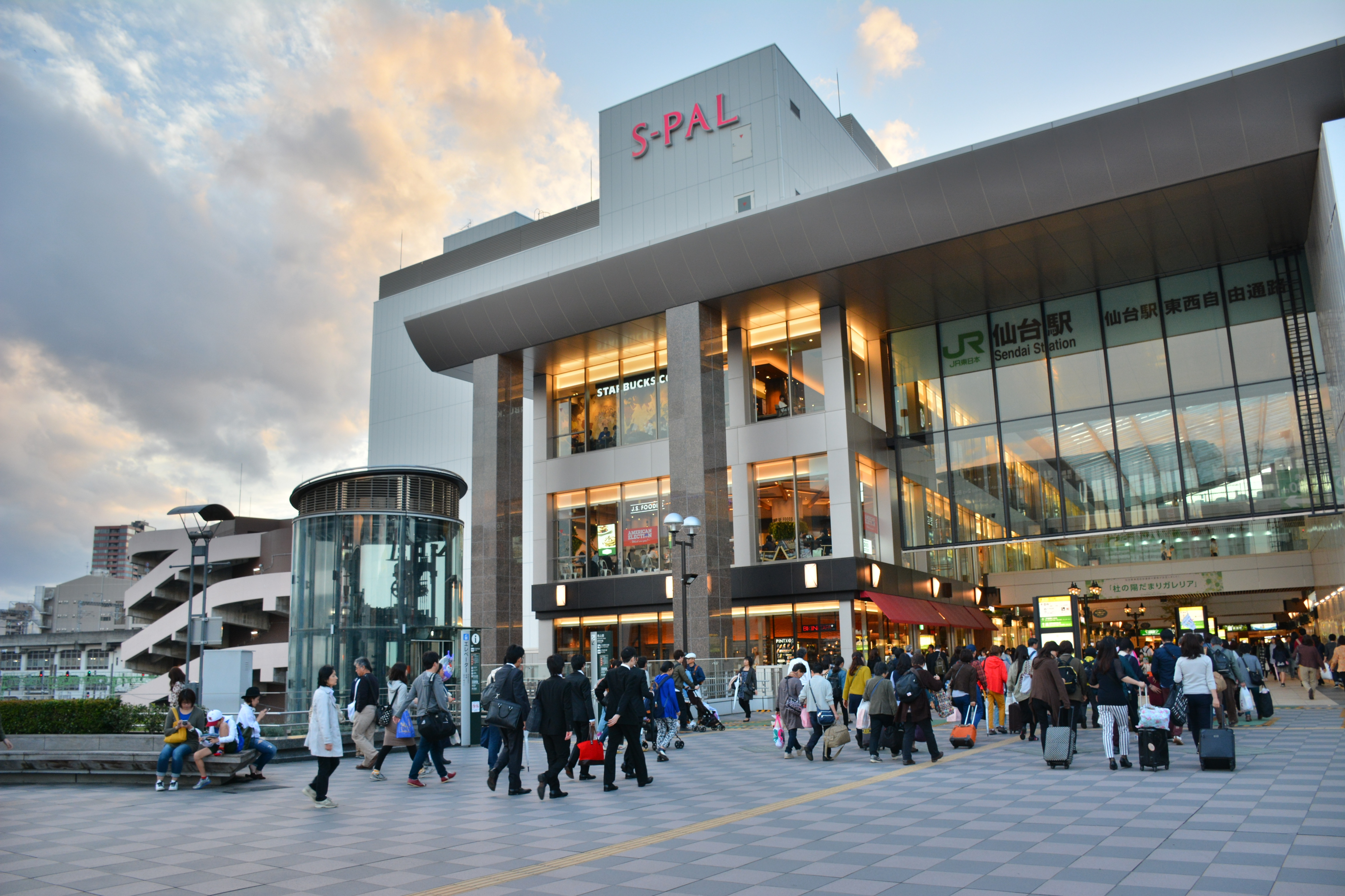 Sendai Station